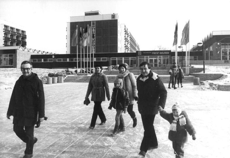 Schwerin, Zippendorf, Ferienheim "Fritz Reuter" ADN-ZB Pätzold-18.2.1985 Schwerin: Neues FDGB-Ferienheim-Mit der kürzlich erfolgten Übergabe des FDGB-Ferienheimes "Fritz Reuter" in Schwerin-Zippendorf, das jährlich rund 26000 Erholungssuchende aufnehmen kann, hat sich die Kapazität dieser Einrichtung im mecklenburgischen Bezirk fast verdoppelt. Der moderne Komplex verfügt über 753 Betten und rund 300 Aufbettungsmöglichkeiten, darunter Doppelzimmer für Familien mit mehreren Kindern. -Siehe auch Motive 1985-0218-22 und 23N